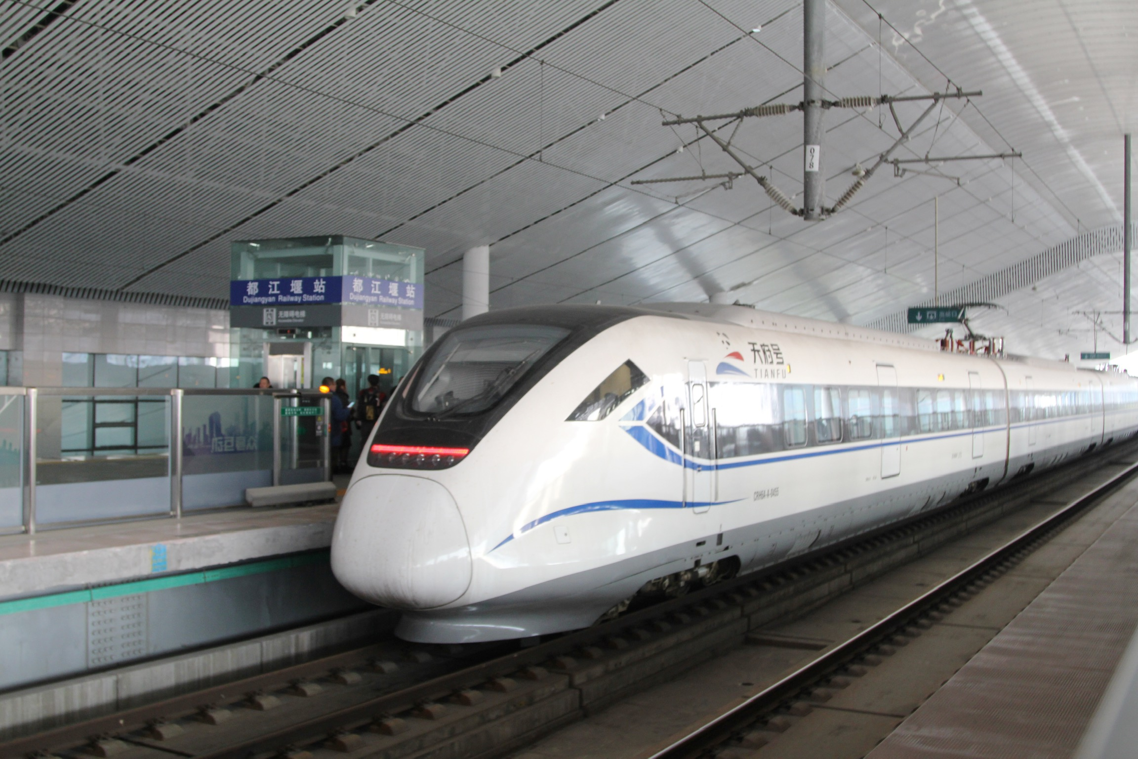 中文（中国大陆）: CRH6A-A “天府号” 在都江堰站